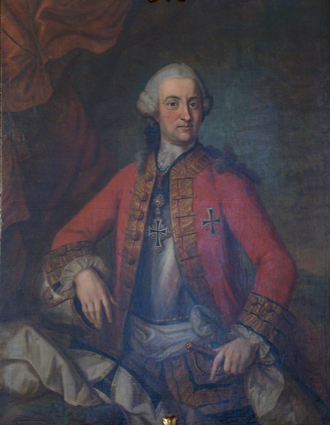 Caspar Anton Reichsgraf von Belderbusch (1722-1784)